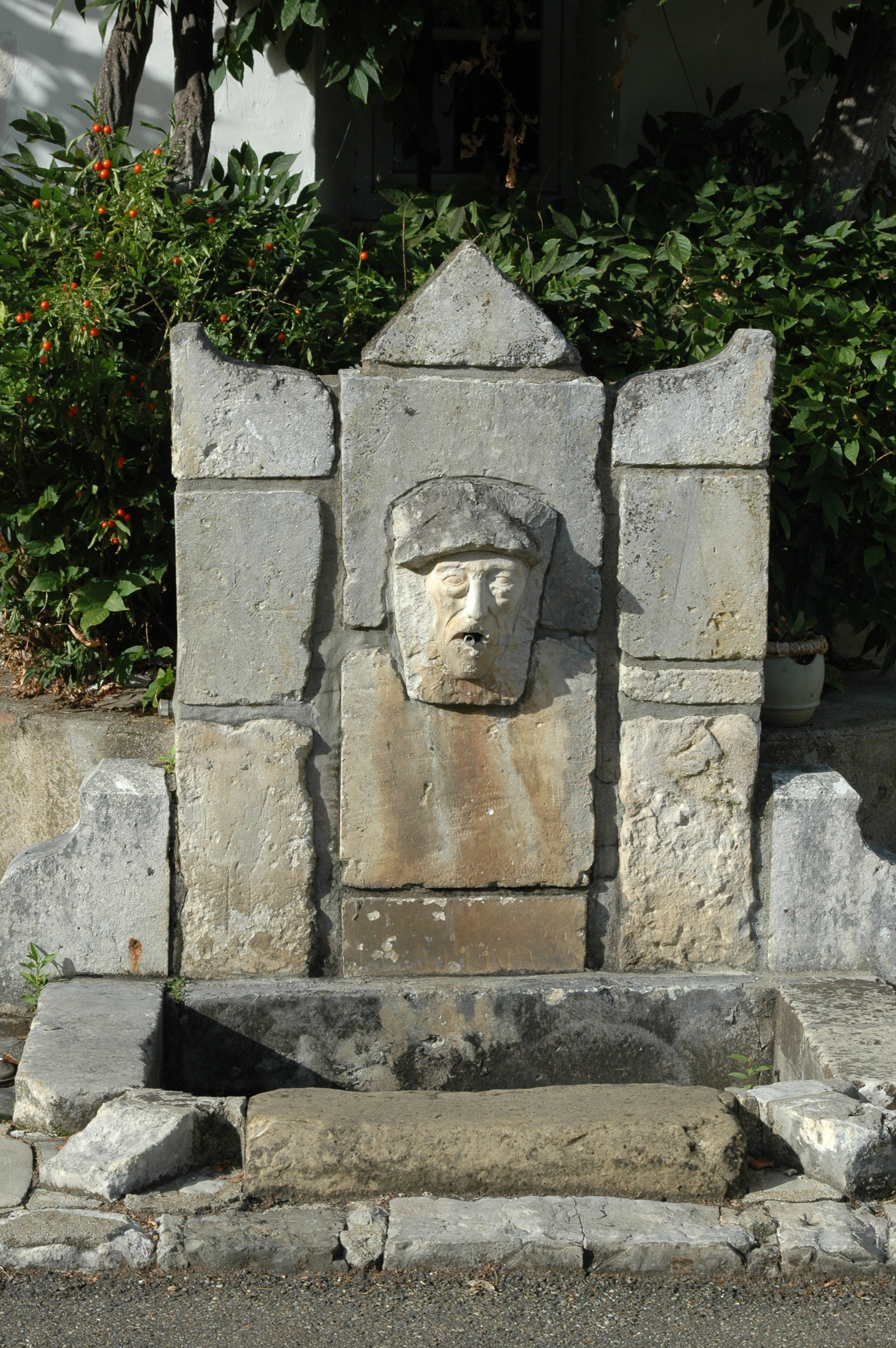 Arcangues, fontaine